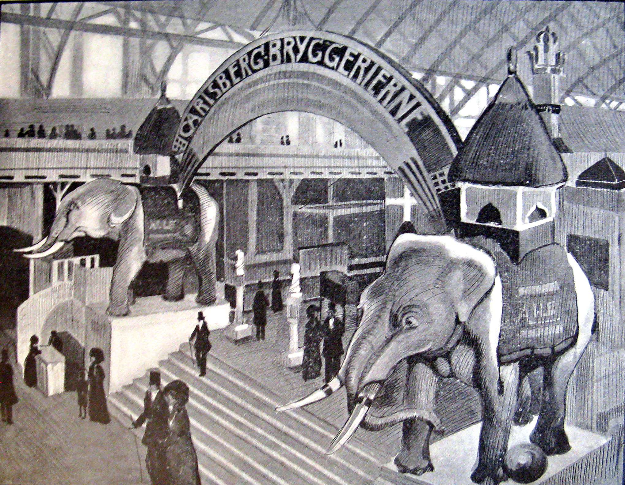 Carlsbergs udstilling i industribygningen ved Landsudstillingen Aarhus 1909